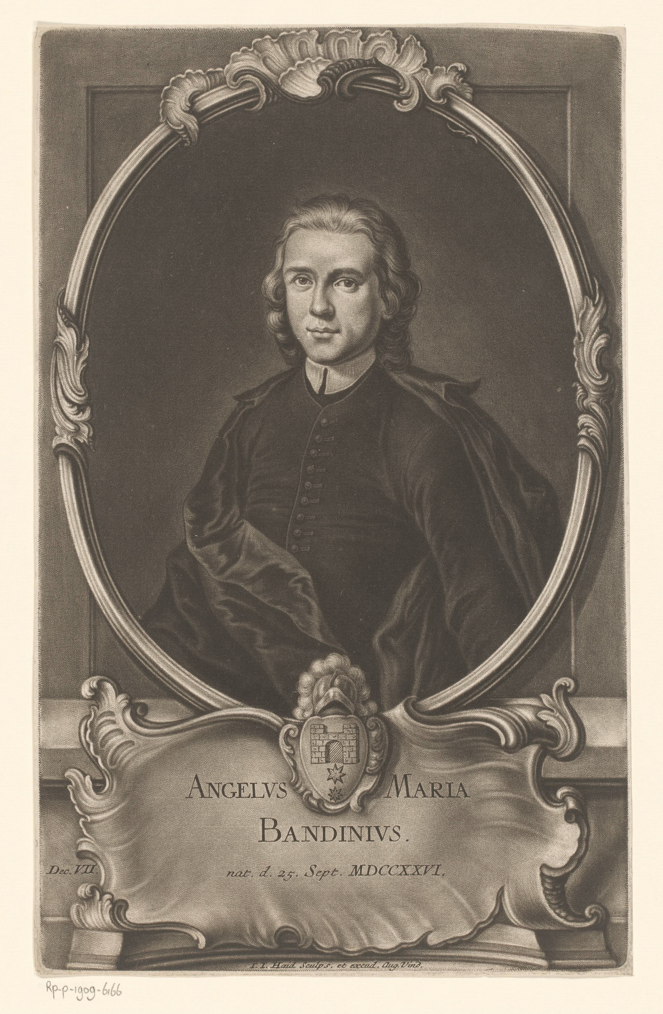 IdentificatieTitel(s): Portret van Angelo Maria BandiniObjecttype: prent Objectnummer: RP-P-1909-6166Catalogusreferentie: HAB A 865Opschriften / Merken: verzamelaarsmerk, verso, gestempeld: Lugt 2228VervaardigingVervaardiger: prentmaker: Johann Jacob Haid (vermeld op object)uitgever: Johann Jacob Haid (vermeld op object)Plaats vervaardiging: AugsburgDatering: 1736 - 1767Materiaal: papier Techniek: mezzotint / etsenAfmetingen: plaatrand: h 316 mm × b 199 mmOnderwerpWat: historical personsrocaille ornamentarmorial bearing, heraldryWie: Angelo Maria BandiniVerwerving en rechtenVerwerving: aankoop 1905Copyright: Publiek domein